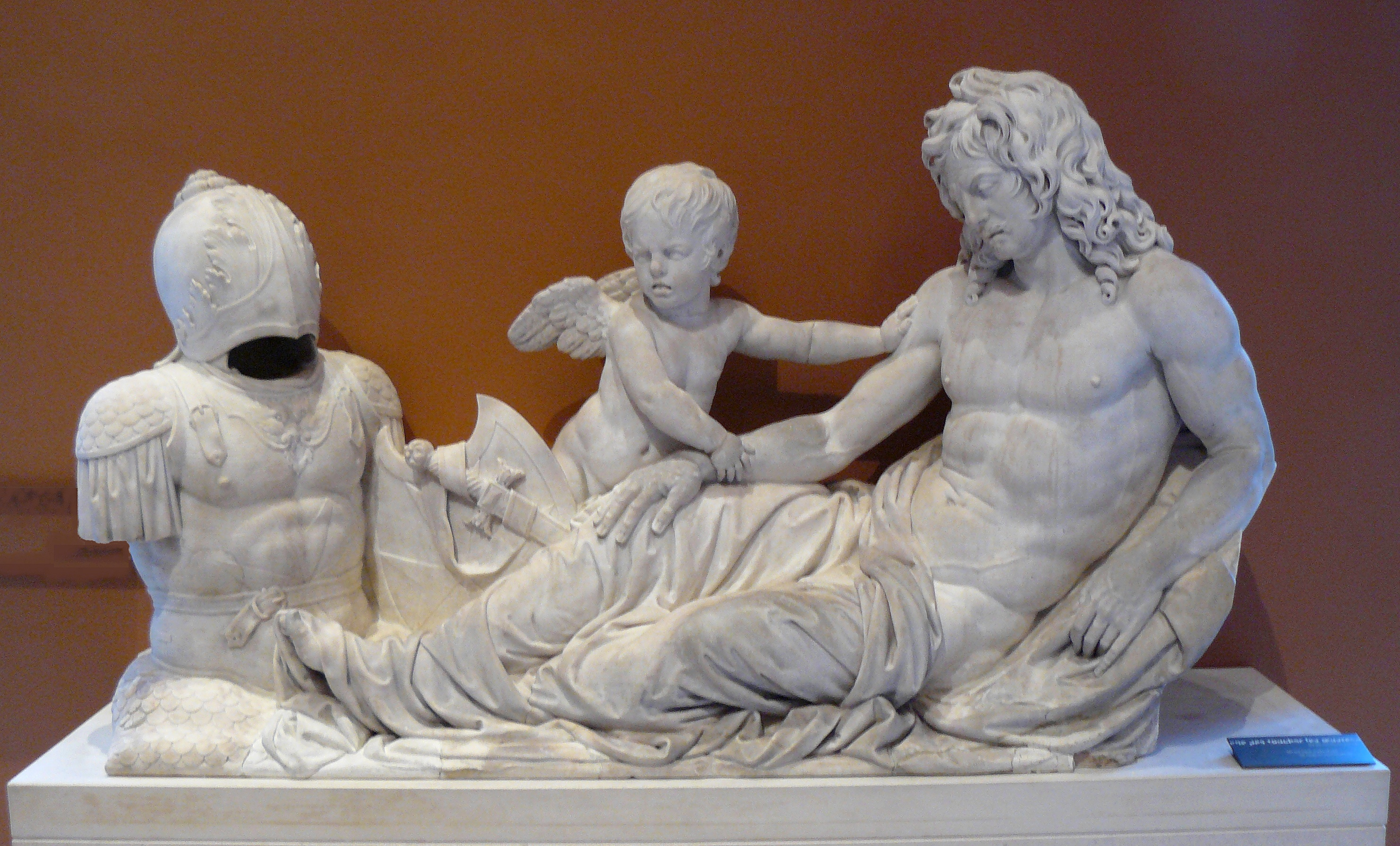 Partie du monument funéraire de Jacques de Souvré (non réalisé)